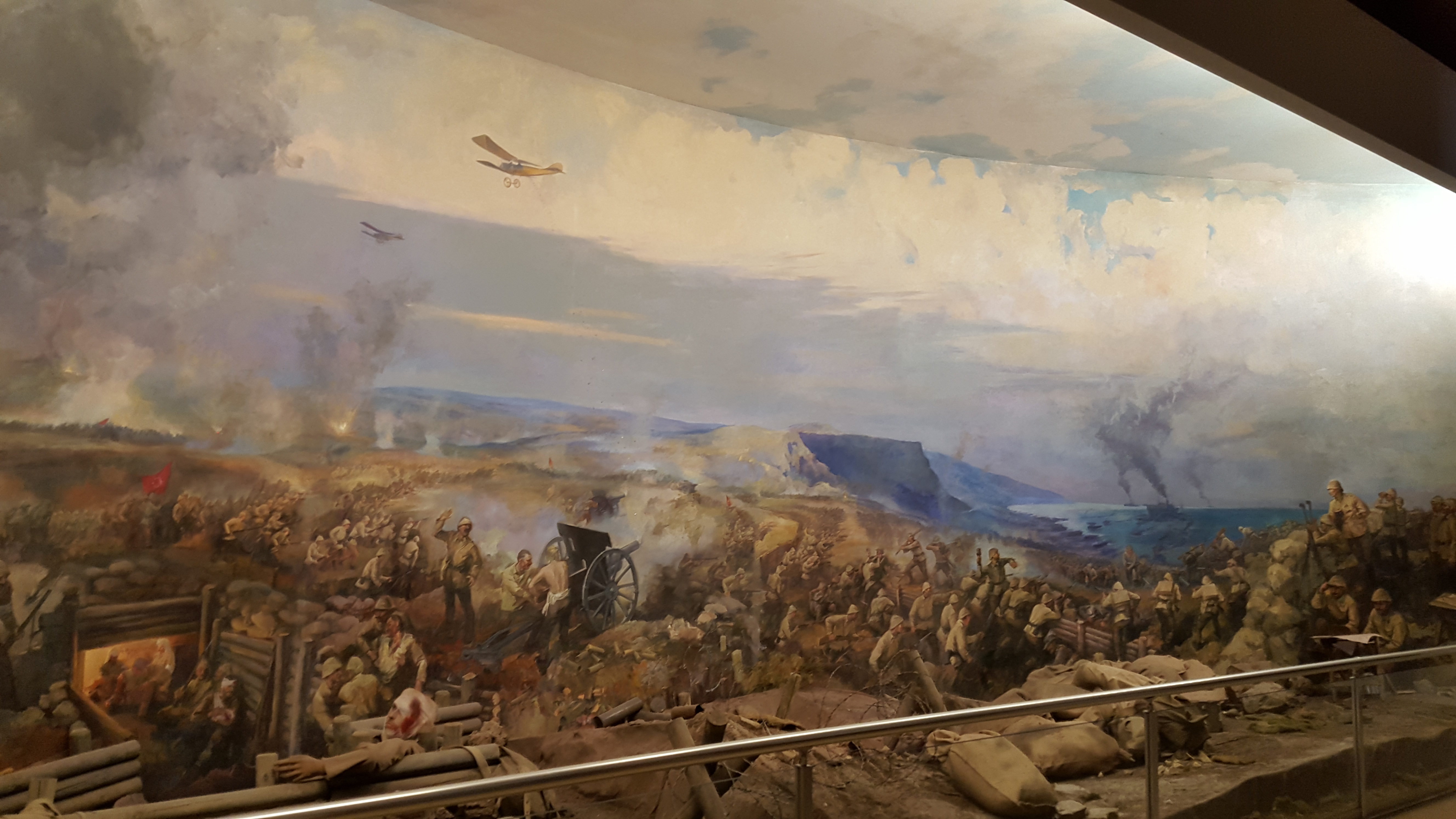 מצג פנורמי המתאר את מערכת גליפולי. מוצג במוזיאון הצבאי באיסטנבול